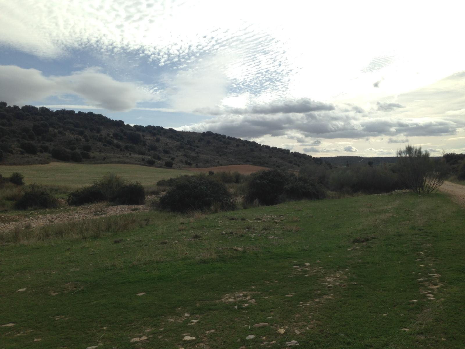 Paisaje de la localidad de Mesones (provincia de Guadalajara, España), en el camino que conduce al municipio de El Cubillo de Uceda.